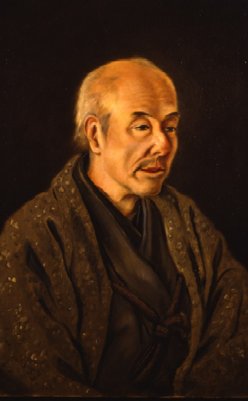 三宅康直の肖像。